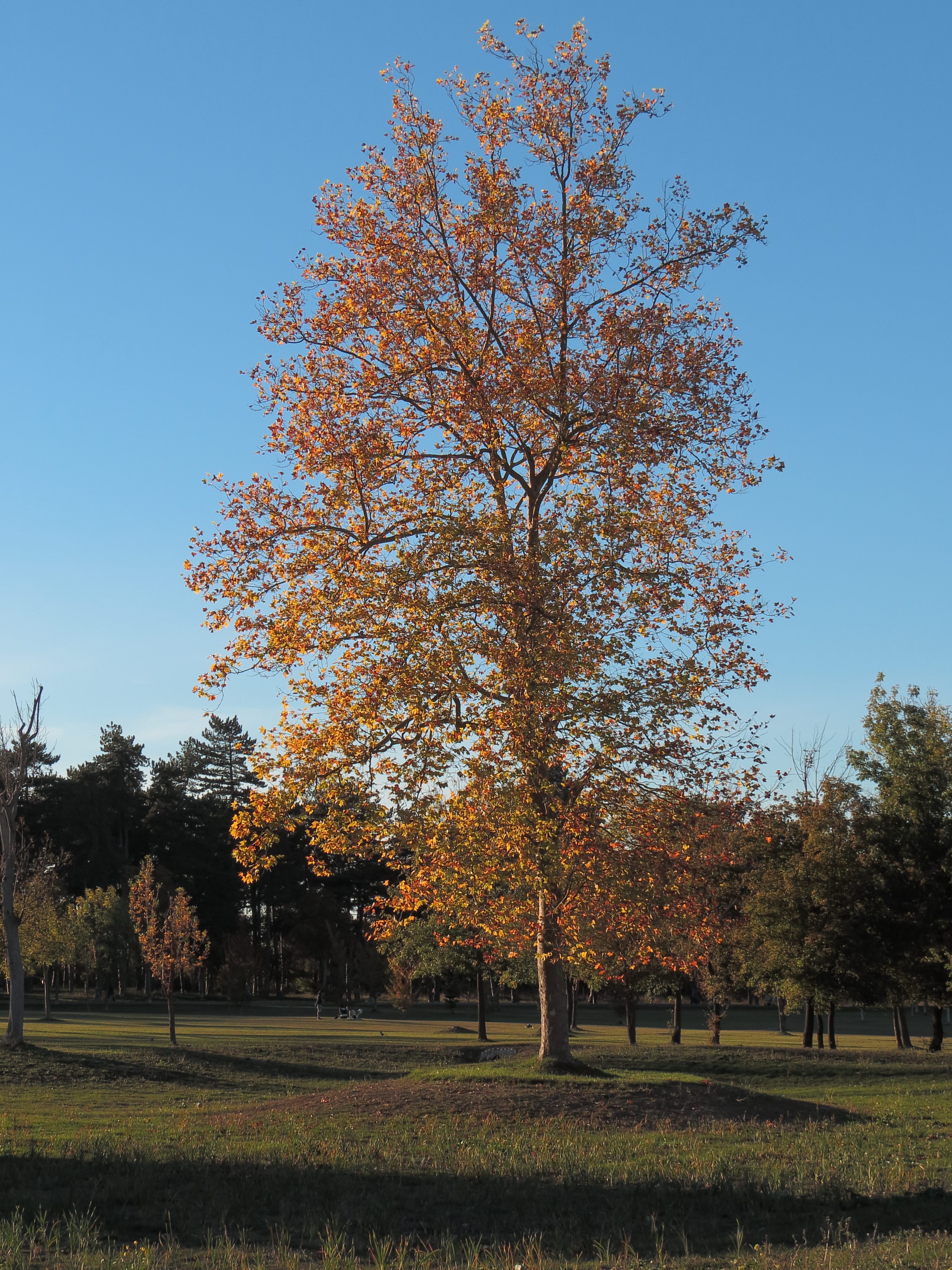 Platane im Herbst. Stadtpark Olárizu, Vitoria-Gasteiz, Baskenland, Spanien